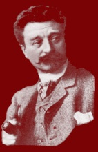 Willem Rip